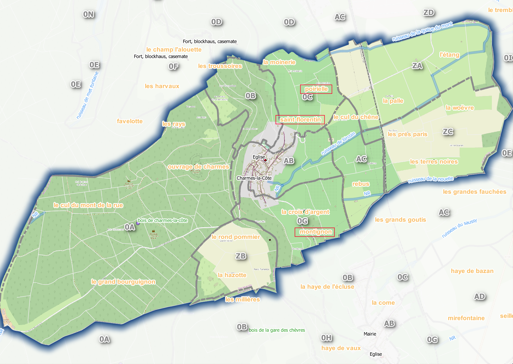 Commune de Charmes-la-Côte, (OpenStreet Map/Qgis)